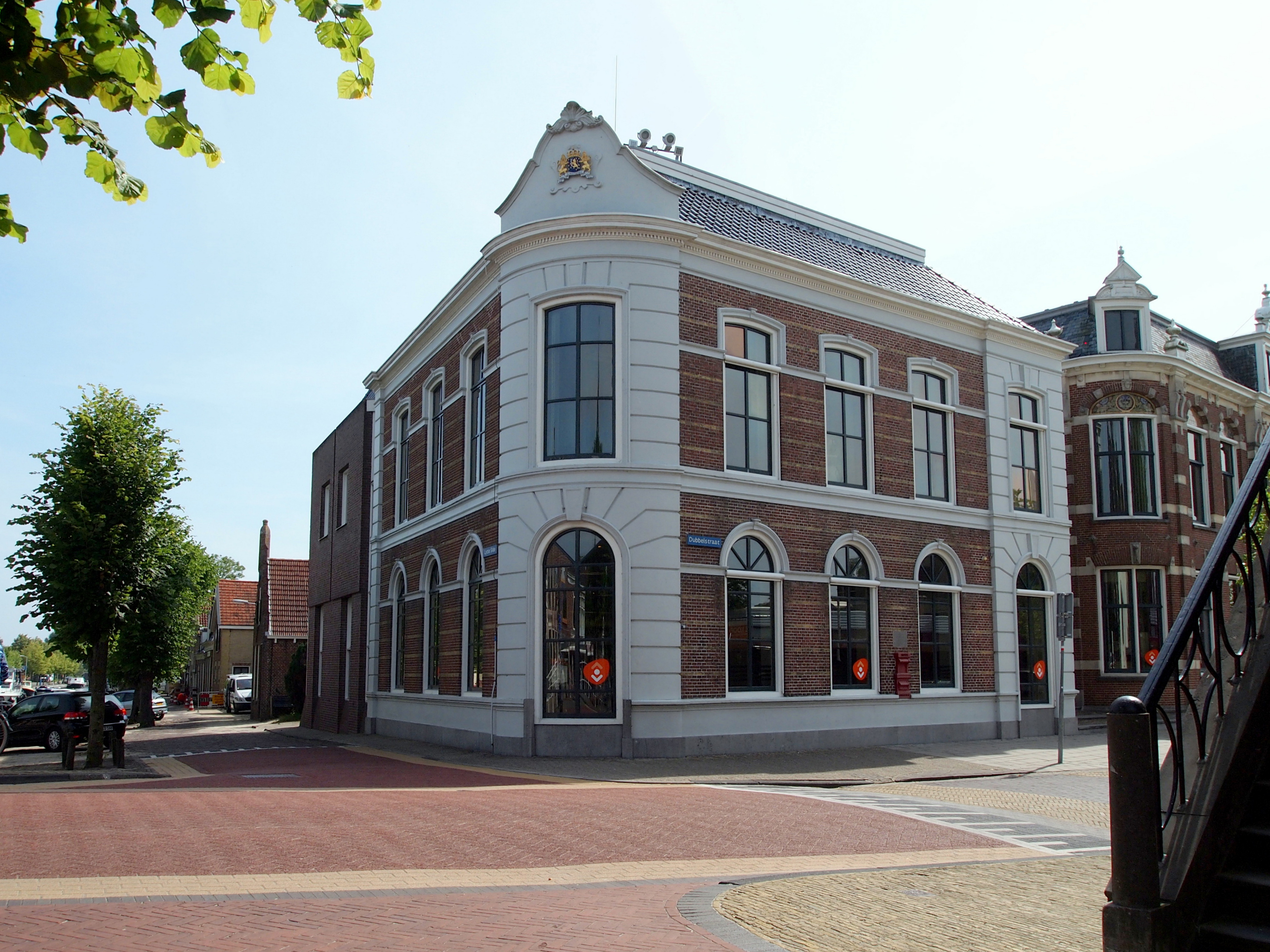 Hoek Dubbelstraat